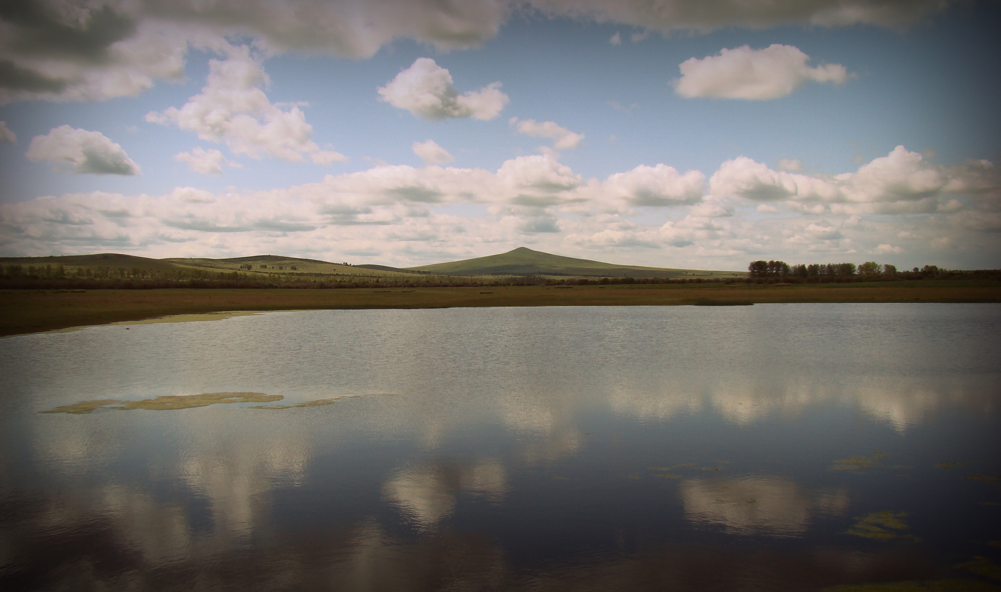 Целебное озеро Киран. Бурятия, Кяхтинский район